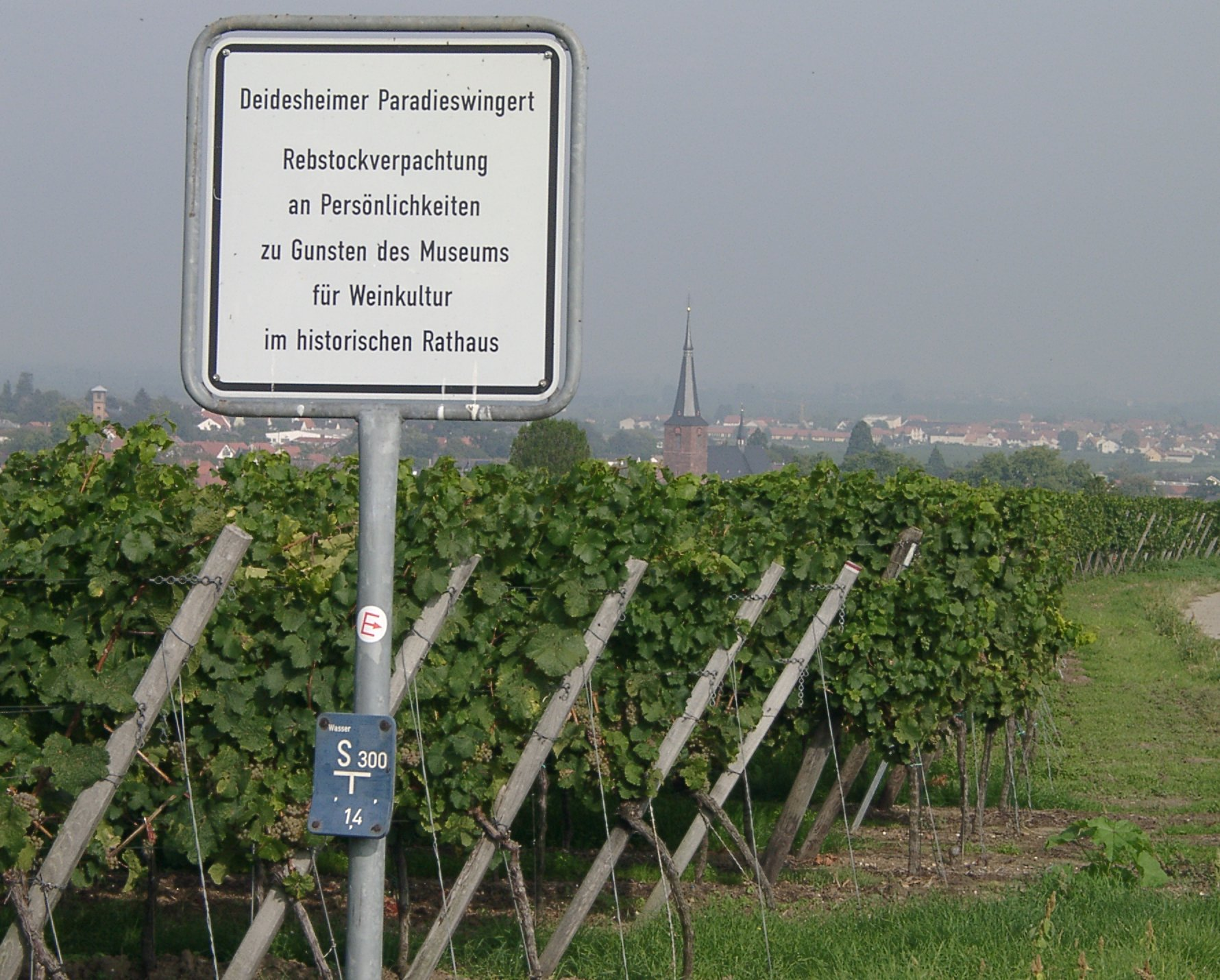 Zu sehen ist ein Bild des "Prominentenweinbergs" in der Deidesheimer Weinlage "Paradiesgarten". Die Stadt im Hintergrund ist die pfälzische Kleinstadt Deidesheim.